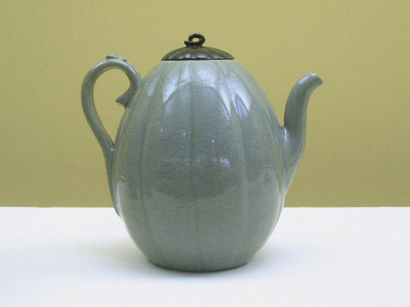 Goryeo celadon, Korea